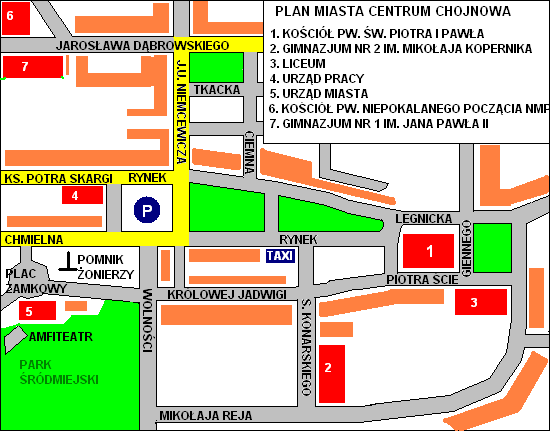 Plan centrum Chojnowa rok 2006.